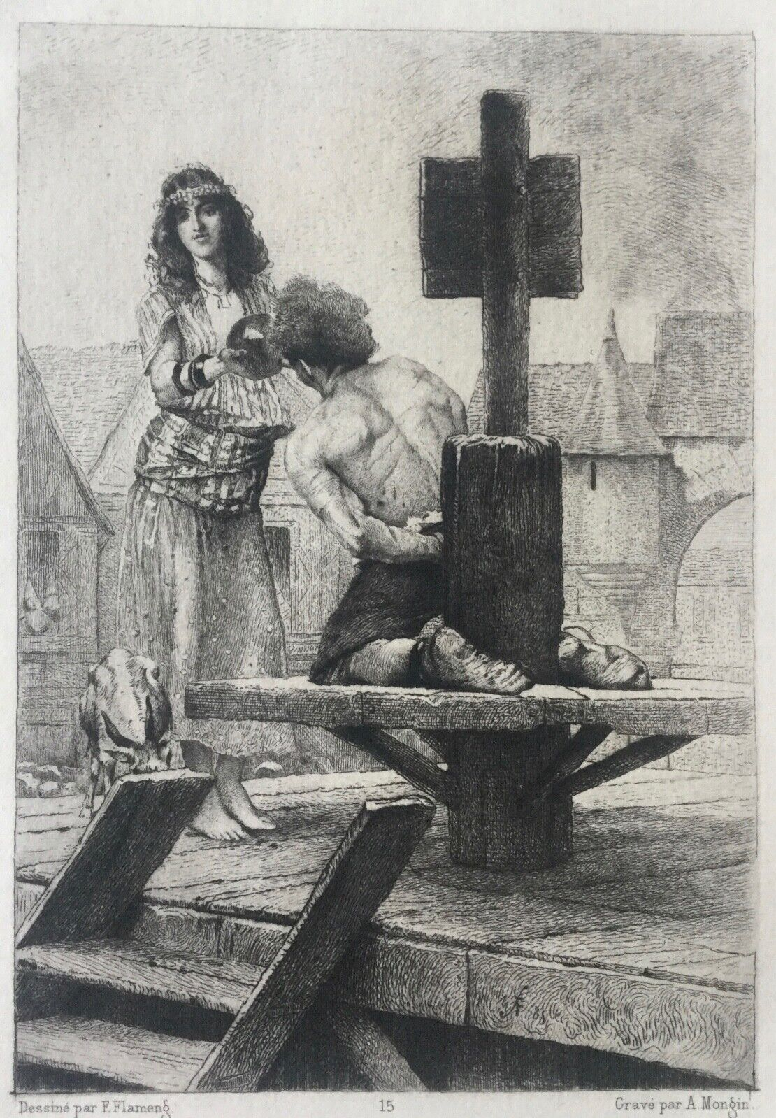 La Esmeralda donne à boire à Quasimodo condamné au pilori. Gravure d'Augustin Mongin d'après un dessin de François Flameng, eau-forte illustrant Notre-Dame de Paris de Victor Hugo.